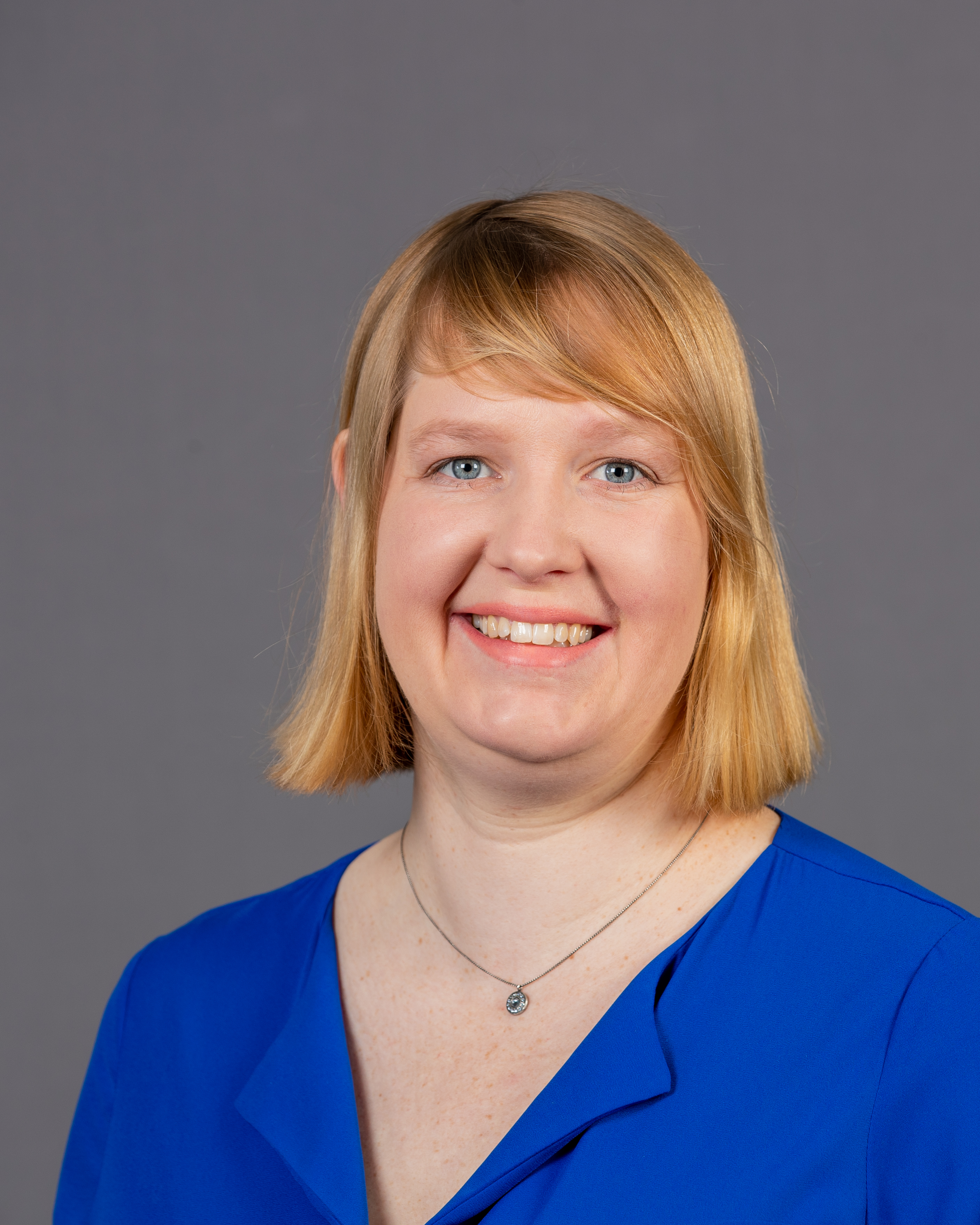 Wiebke Esdar, SPD